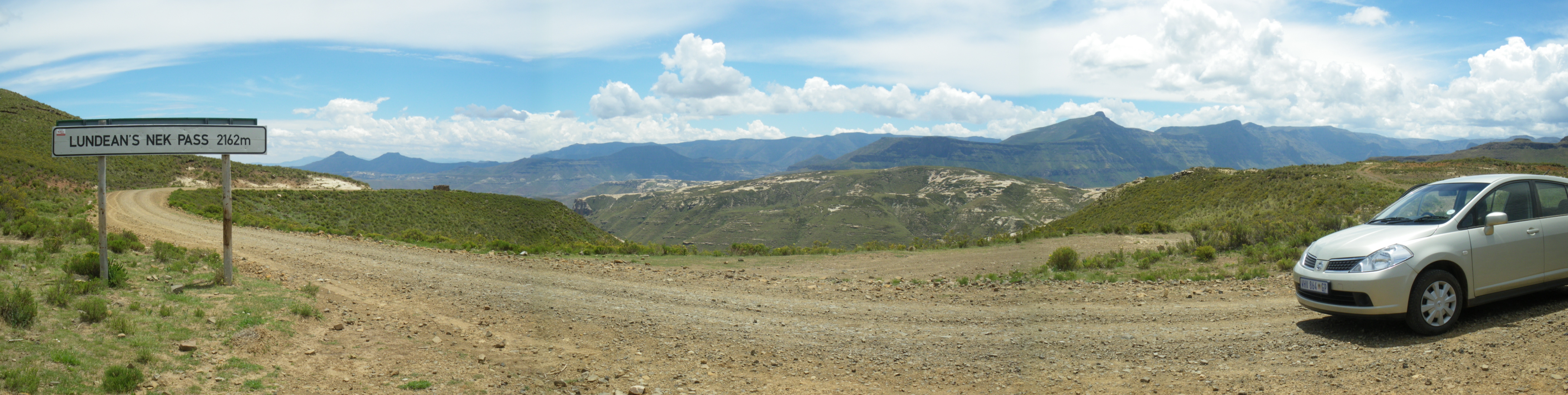 Col de montagne du Lundean's Nek (Witteberg) en Afrique du Sud. La voiture est une Nissan Tiida Latio